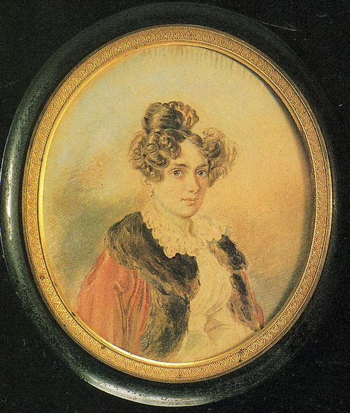 Устинья Васильевна Козлова, ур. Зиновьева (1808—1897)